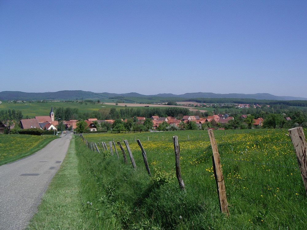 Uttwiller, Bas-Rhin, France